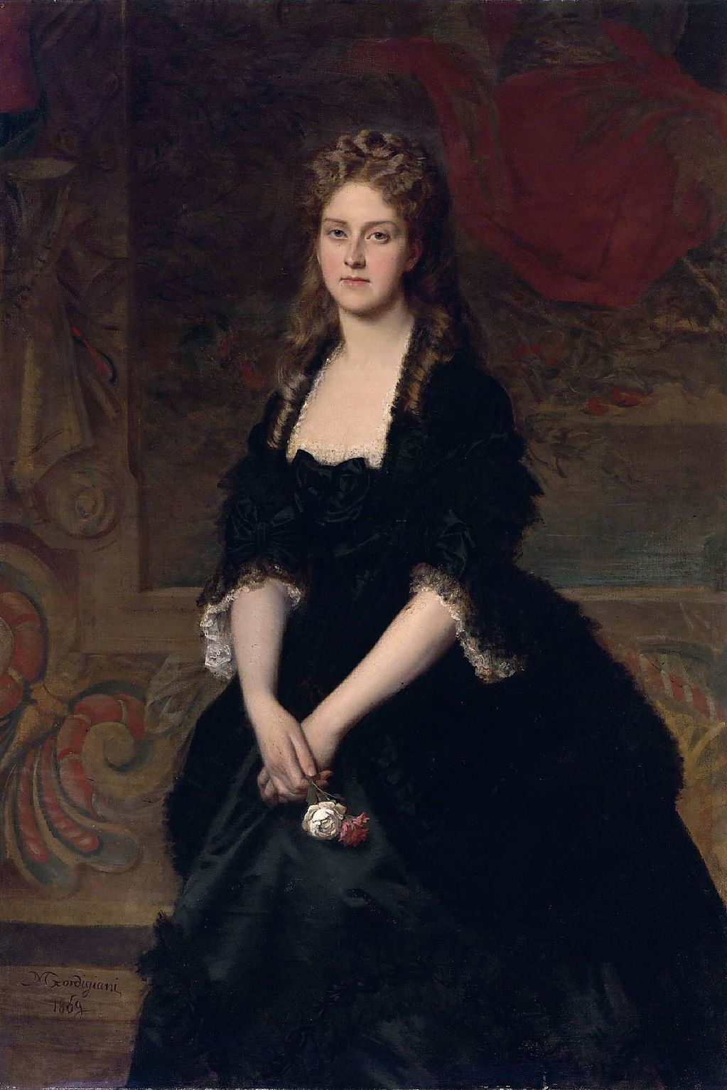 Portrait of Nadezhda Mikhailovna Polovtsova